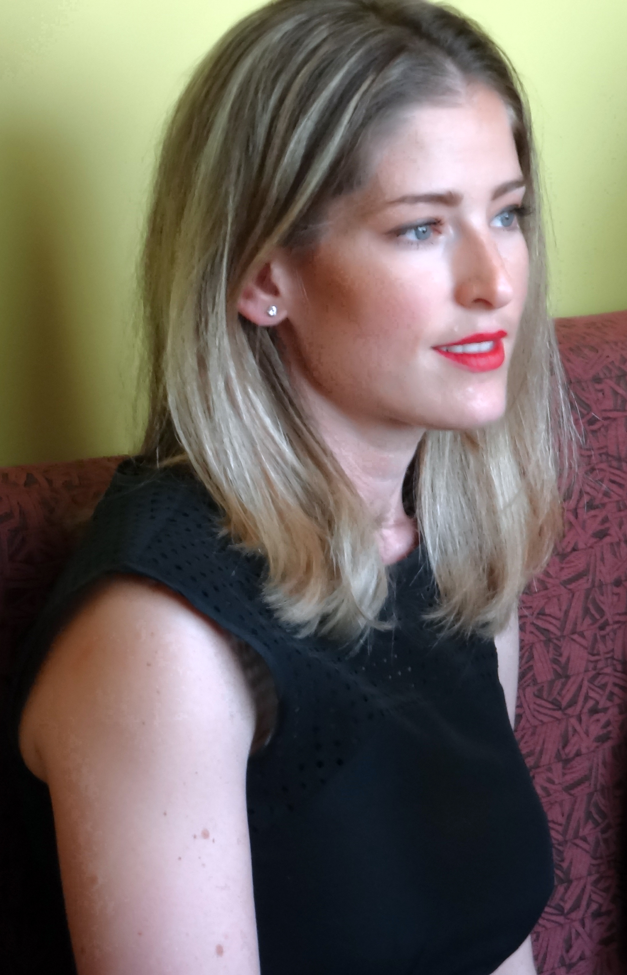 María Inés Guerra durante una entrevista en 2015.